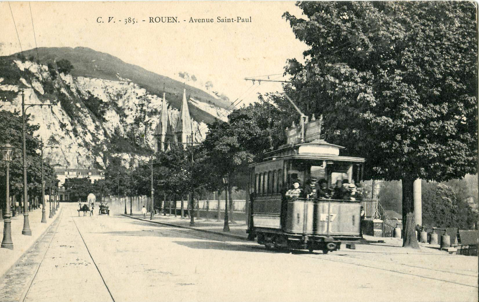 Carte postale ancienne éditée par C. V., n°385 : ROUEN - Avenue Saint-Paul